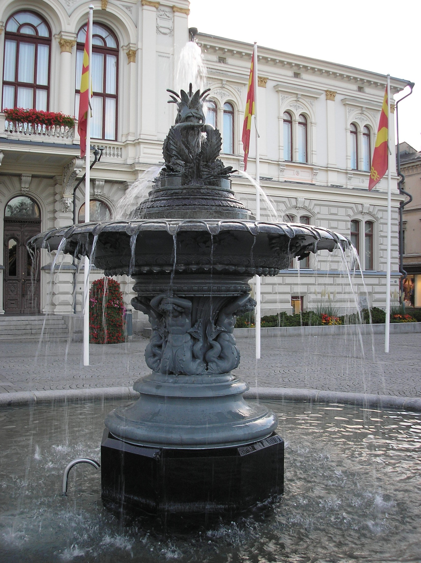 Robert Huberin (1844–1905) vuonna 1883 paljastettu suihkulähde Tampereen Keskustorilla. Taustalla Raatihuone.